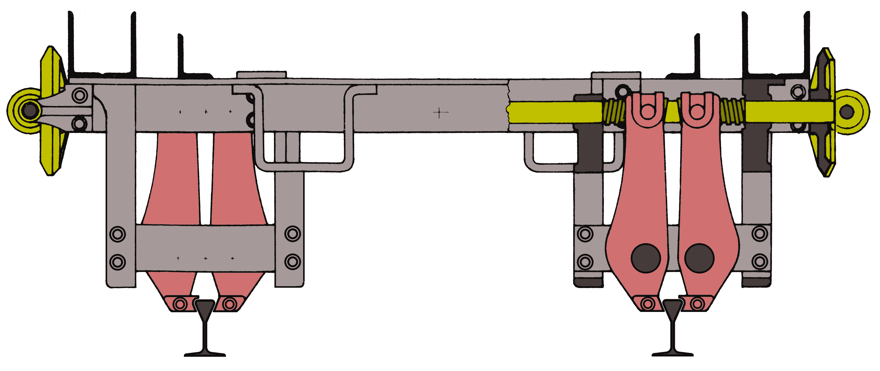 Brake of the Pöstlingbergbahn in Linz